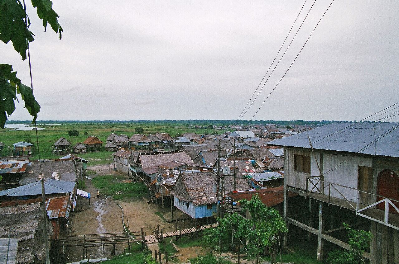 El Barrio de Belén, comúnmente conocido por los turistas como la "Venecia del Amazonas"